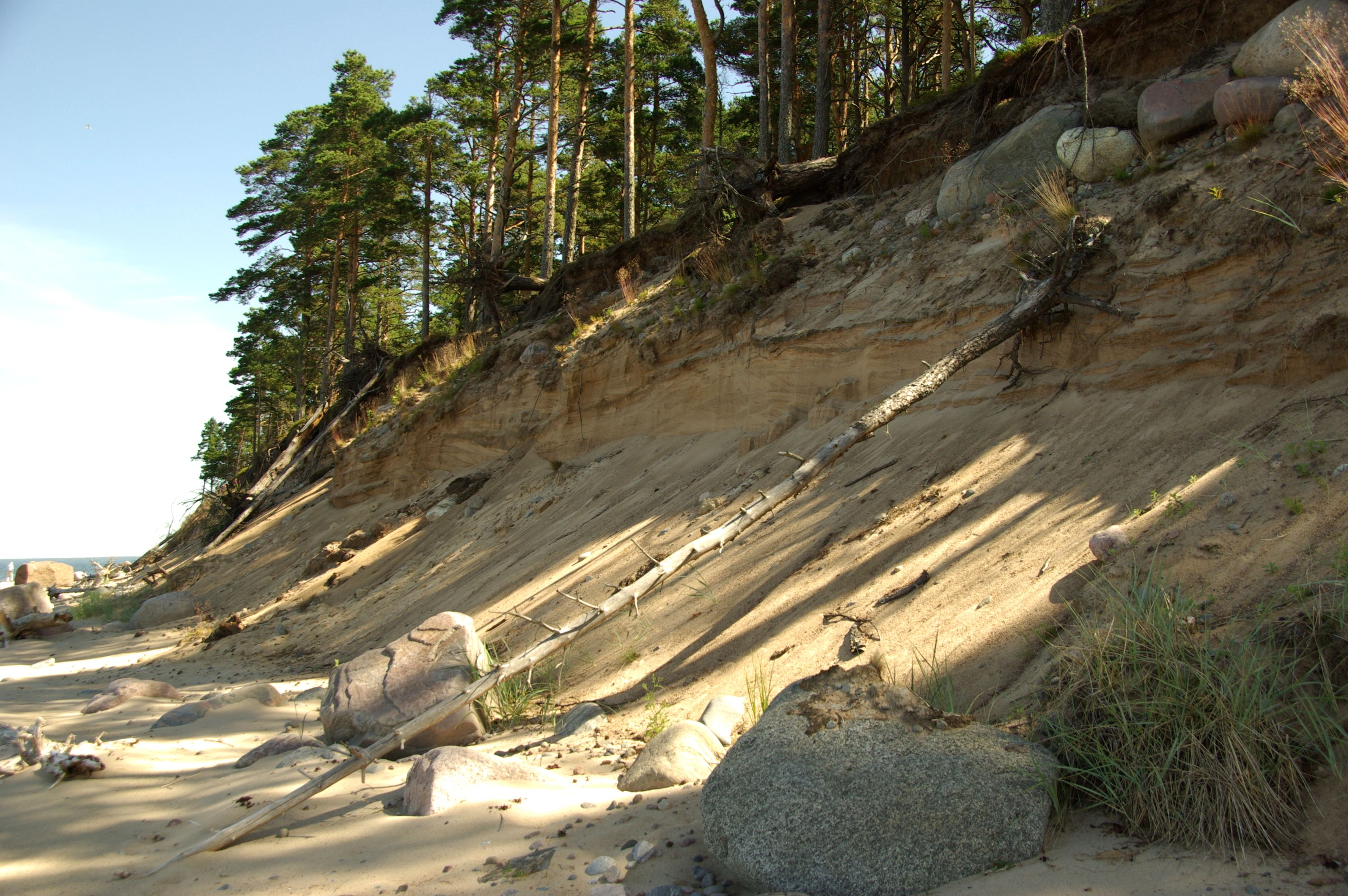 Pedassaar on saar Põhja-Eestis Kolga lahes.Saar asub umbes kilomeetri kaugusel Salmistu külast.